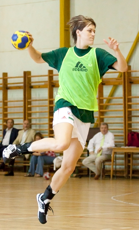 Tomori Zsuzsanna válogatott magyar kézilabdázó.